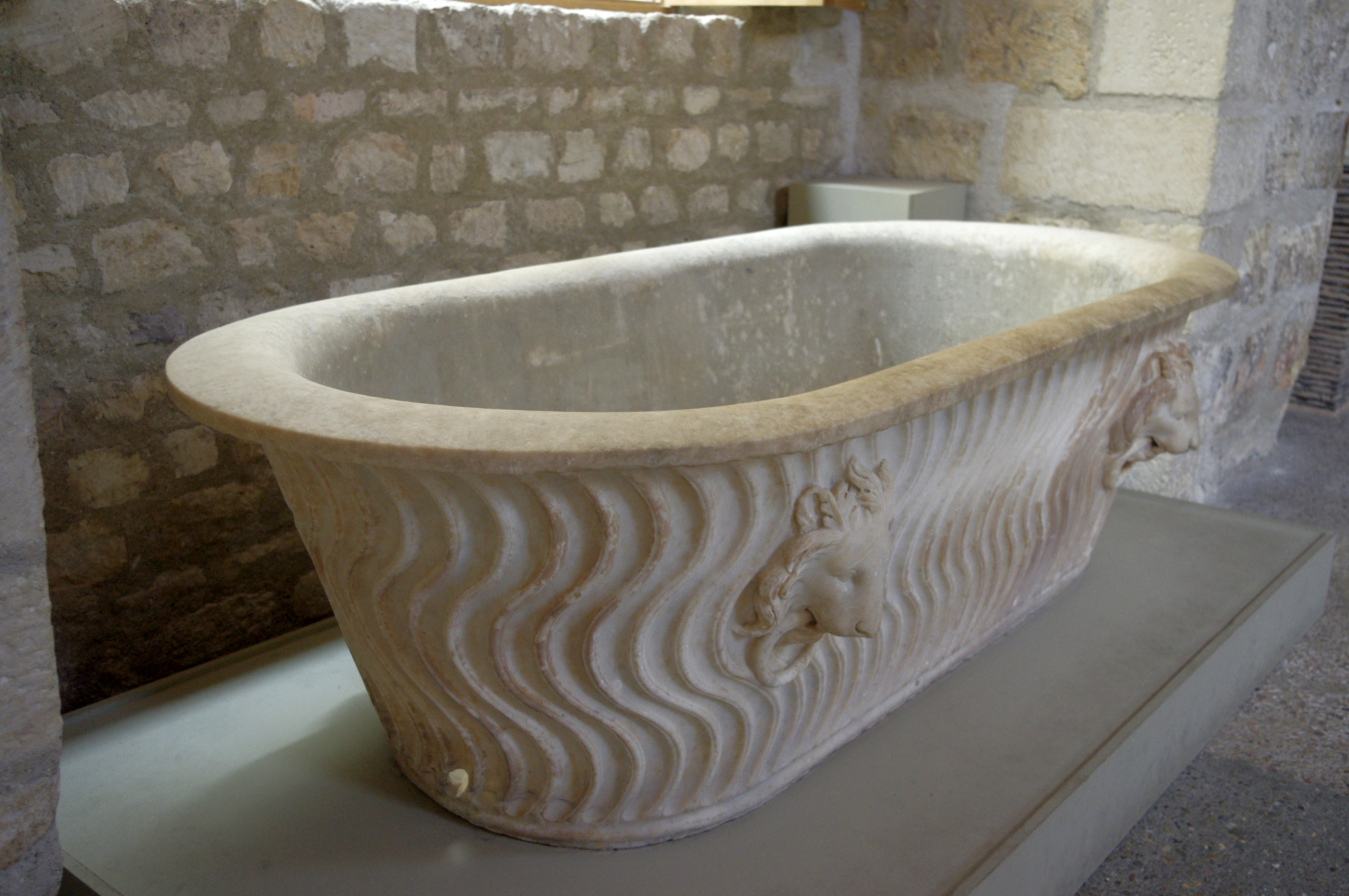 Frigidarium - Musée de Cluny, Paris. Baignoire ou vasque, marbre, Italie 1er-3e siècle (?)